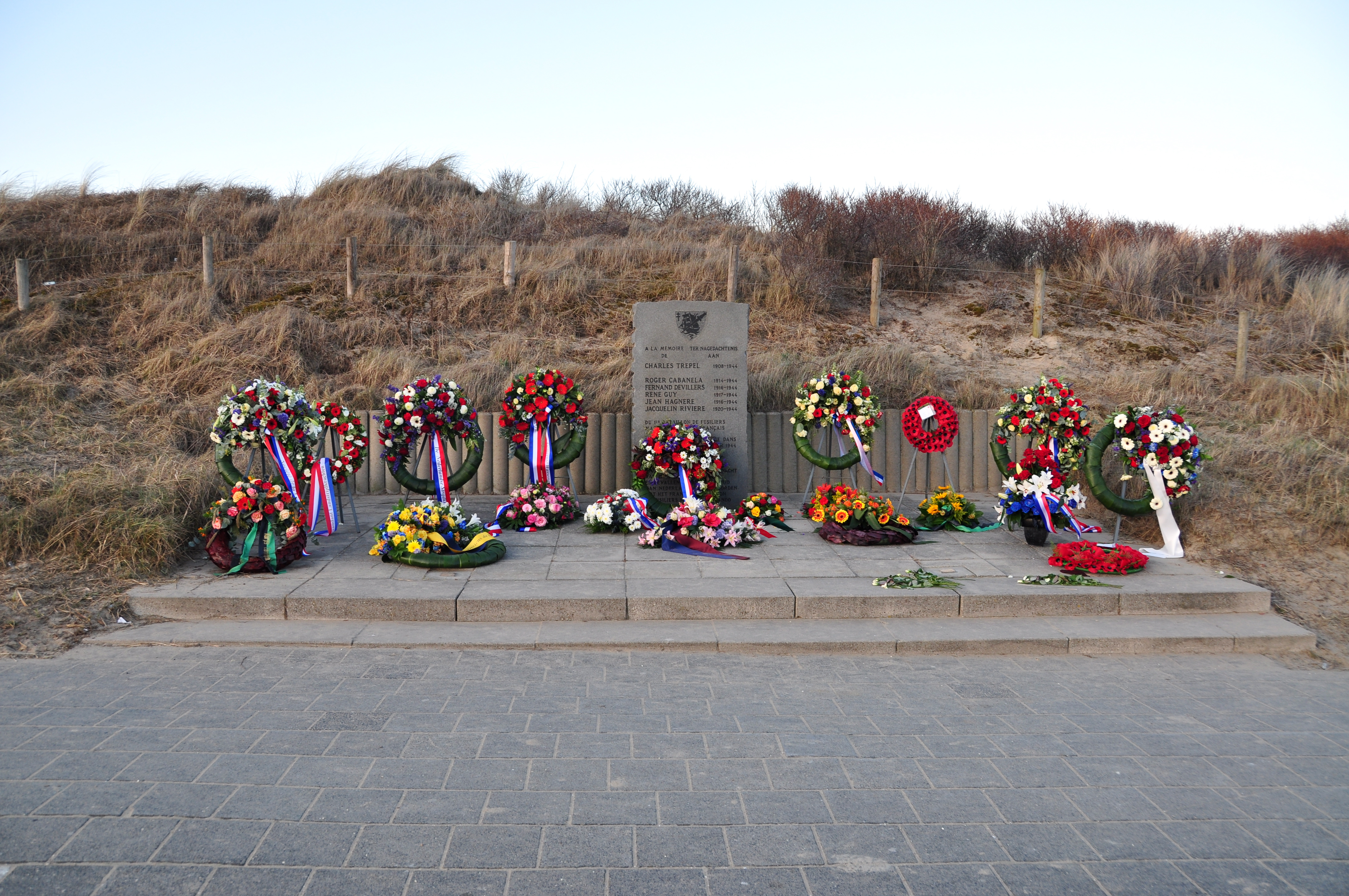 Oorlogsmonument aan de Wassenaarse Slag voor zes Franse commando's die daar aan land zijn gekomen en daar zijn gesneuveld.